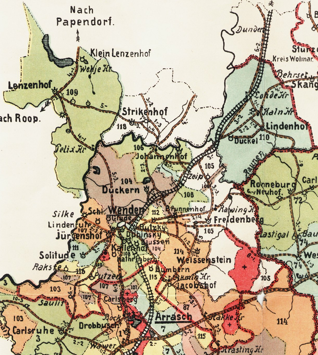 Võnnu kihelkonna (Võnnu kreis) mõisad 1903. aasta kaardil.